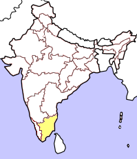 Kartan bygger på resultatet från valet till Lok Sabha april/maj 2004. Gult betyder att partiet lanserat en eller flera kandidater i delstaten, dock utan att vinna mandat. Orange betyder att partiet vunnit mandat från delstaten. Rött betyder att partiet vunnit minst 25% av mandaten från den delstaten och mörkrött 50% eller mer. Kartan tar inte hänsyn till avhopp, partifusioner och fyllnadsval under den ordinarie mandatperiodens gång.